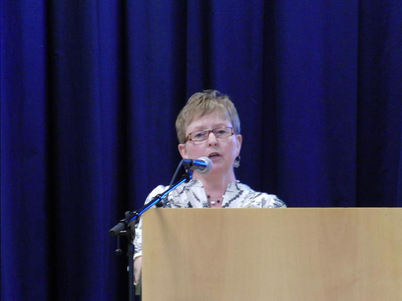 Inger Marit Sverresen er lokallagsleder i Sarpsborg KrF